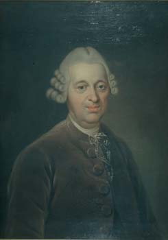 Wiguläus von Kreittmayr (1705-1790), bayerischer Staatskanzler